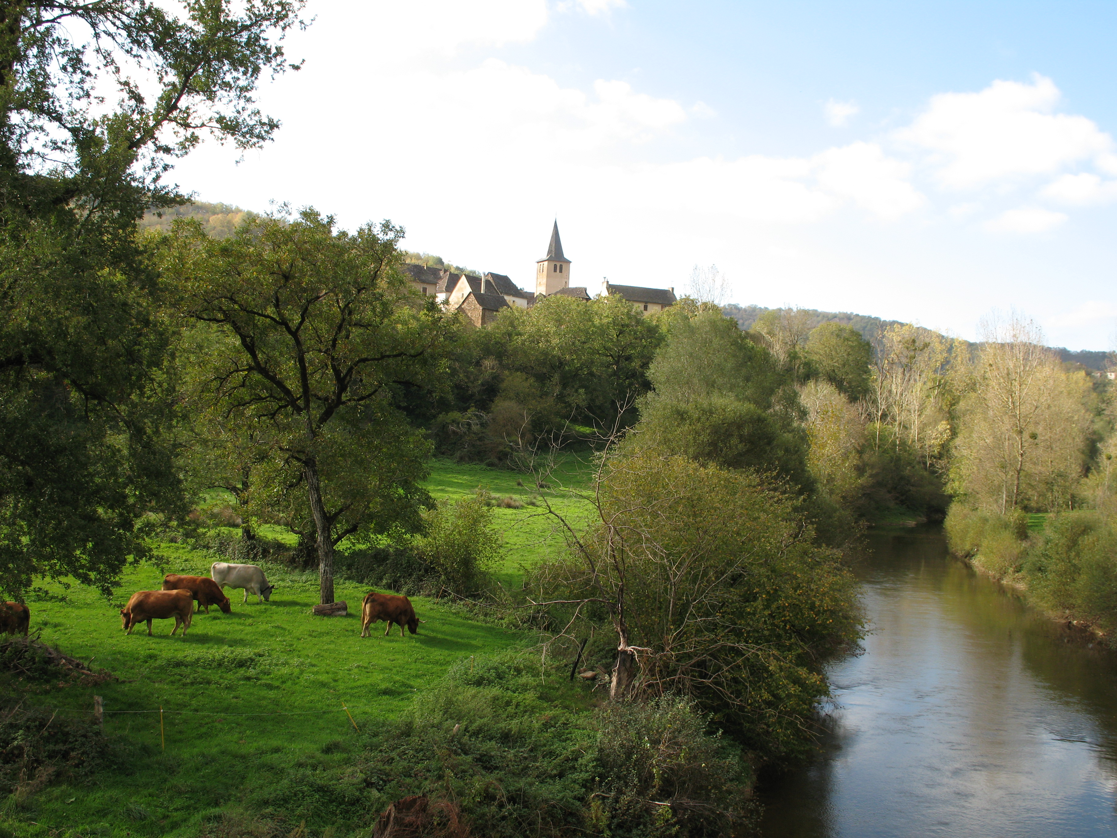 Vue générale Prévinquières (Aveyron)